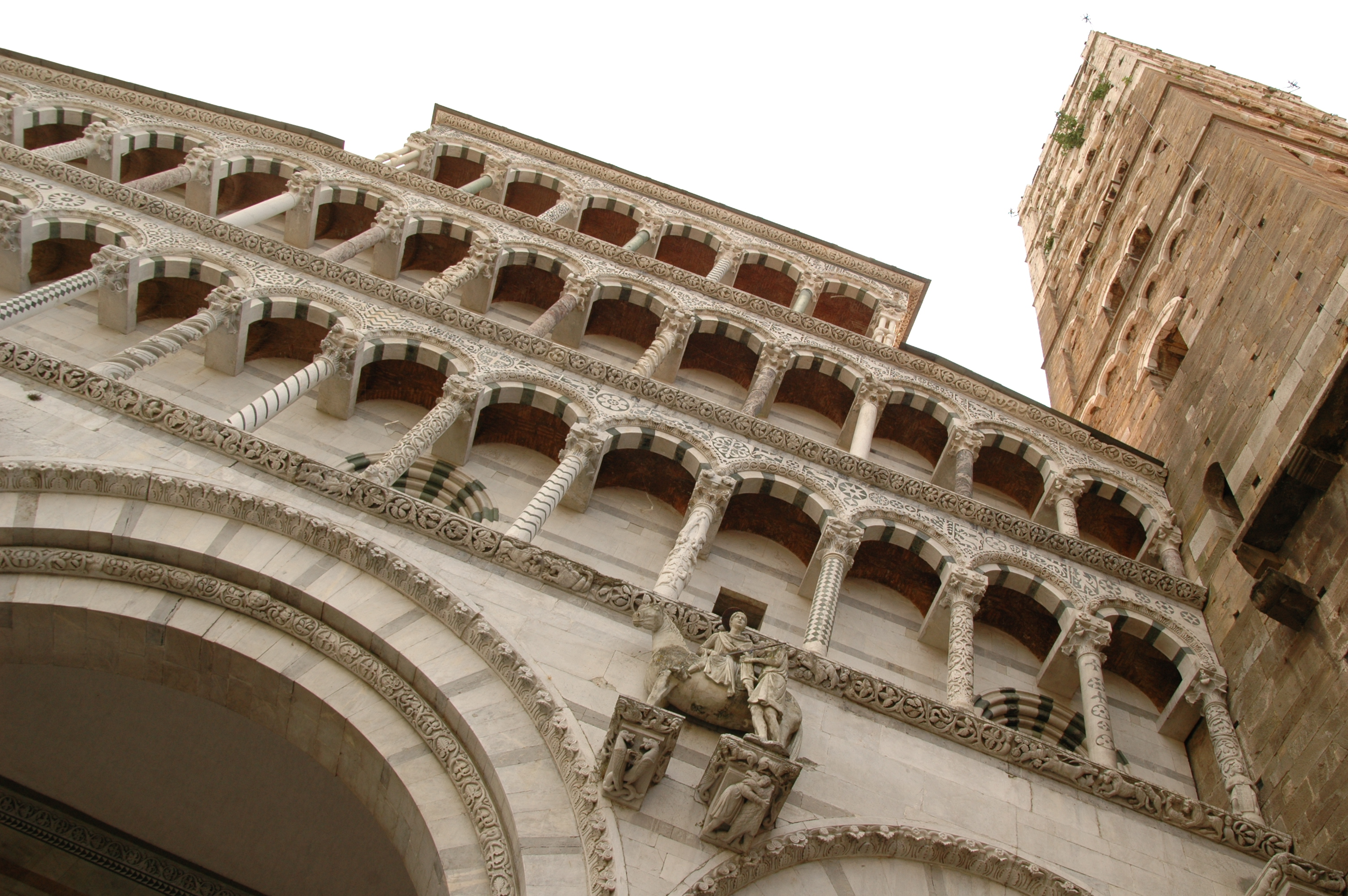 Cattedrale di San Martino (Lucca)